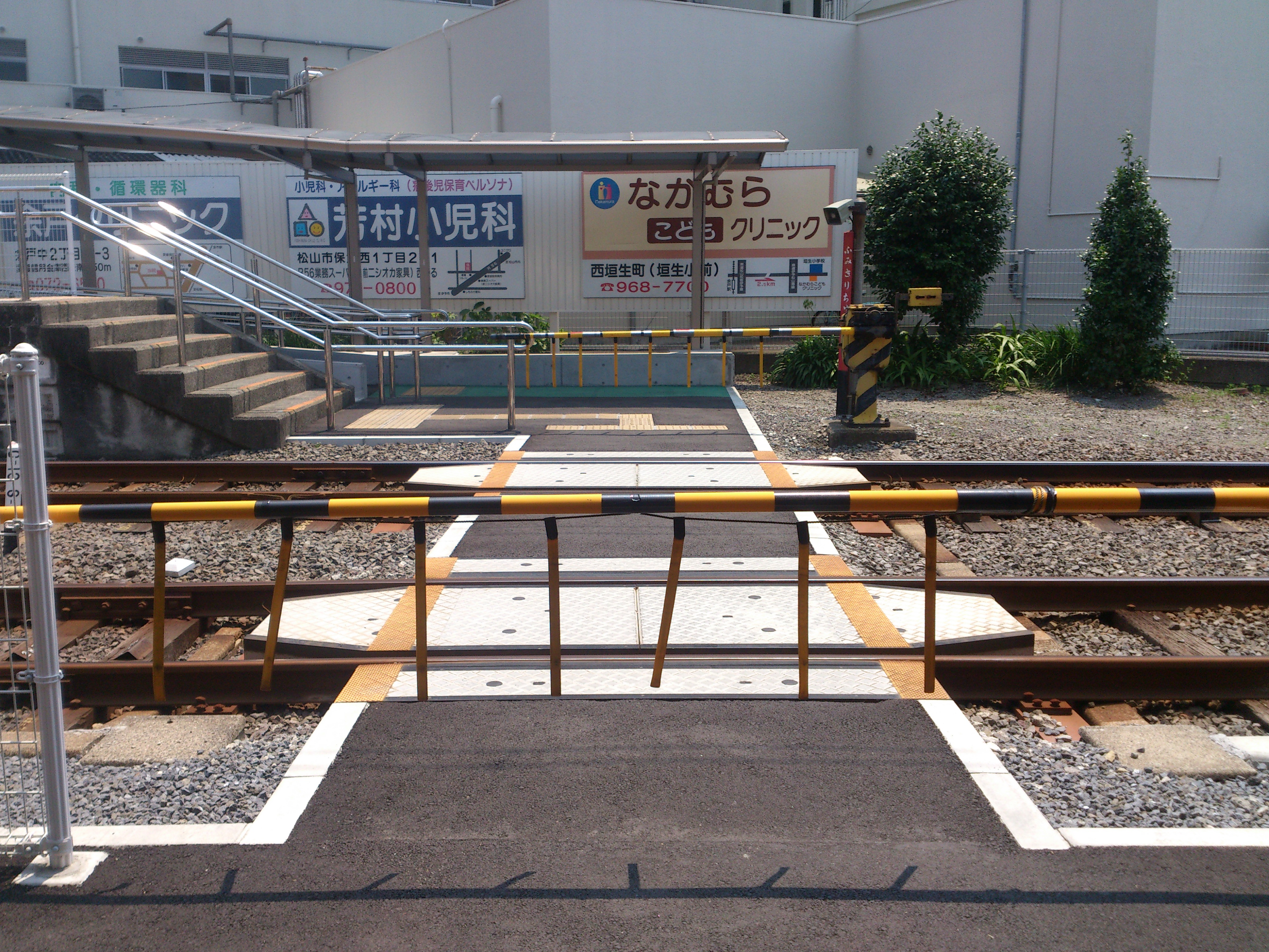 伊予鉄道 余戸駅の構内踏切